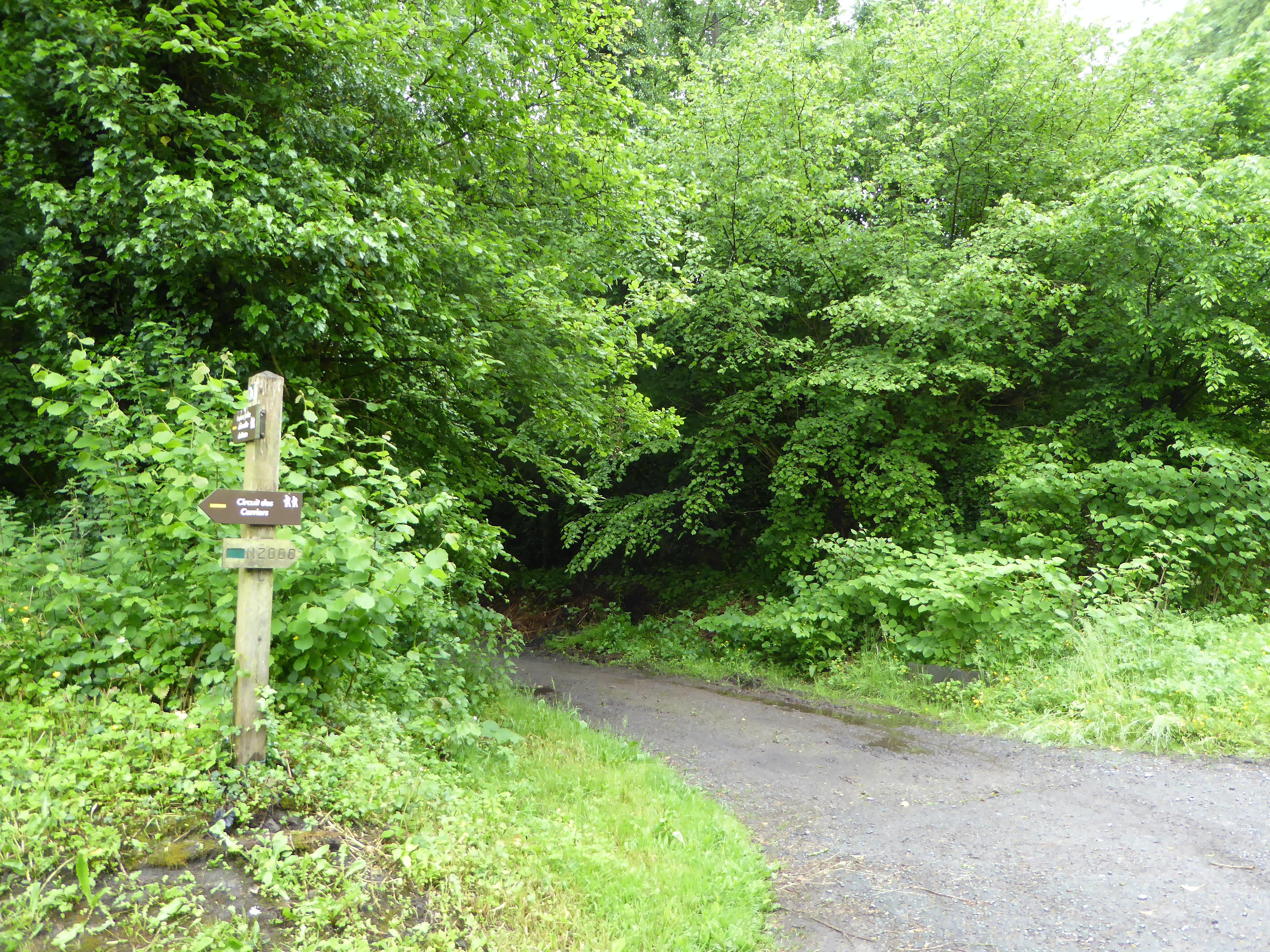 A l'orée de la réserve naturelle régionale du bois d'Encade Rue du Piémont Gussignies.- Nord.- France.